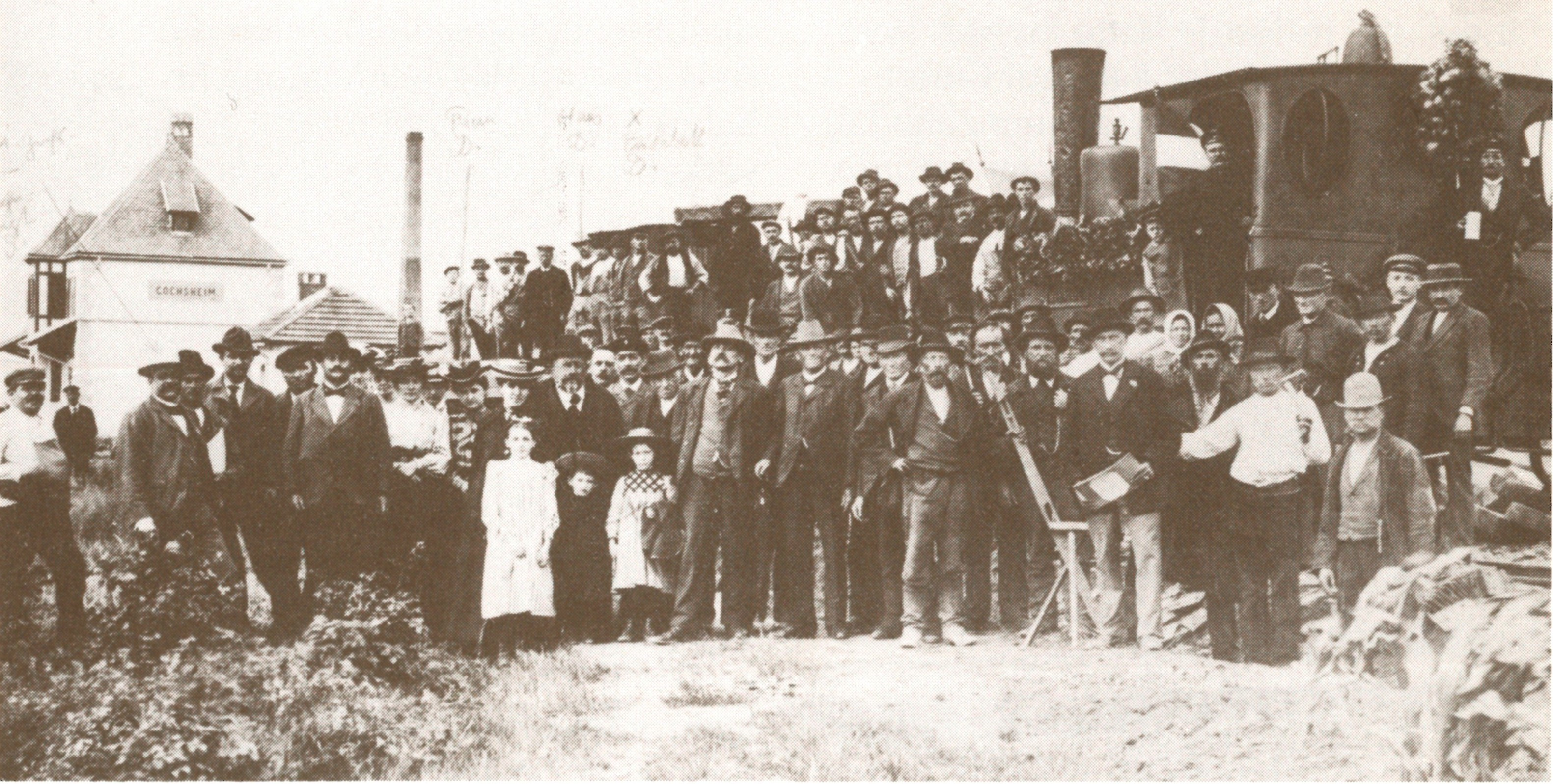 Schweinfurt/Gochsheim Fotografie 1903: Probefahrt der Lokalbahn Schweinfurt-Gerolzhofen am 18. November 1903.